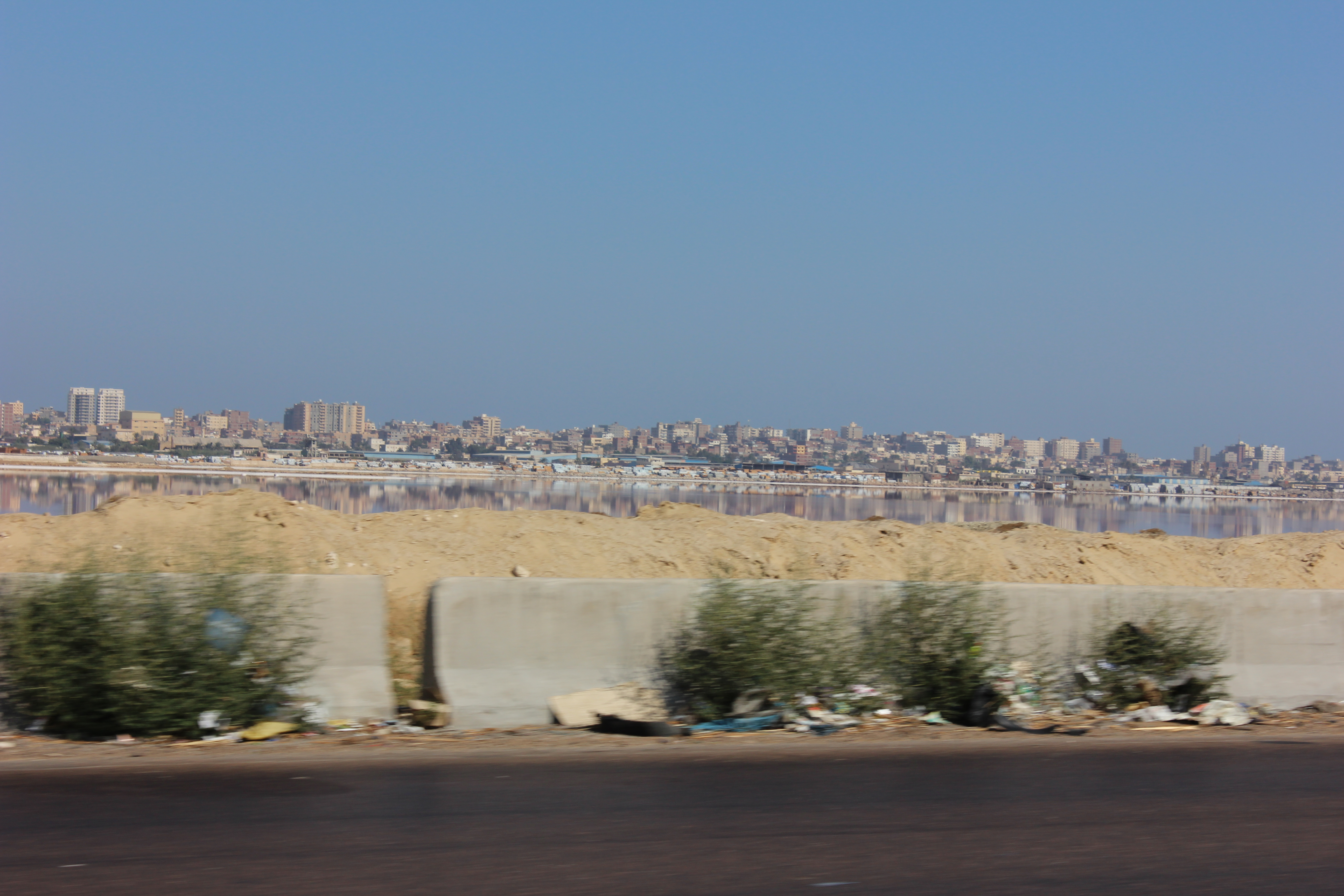 الطريق الدولي الساحلي بالإسكندرية.